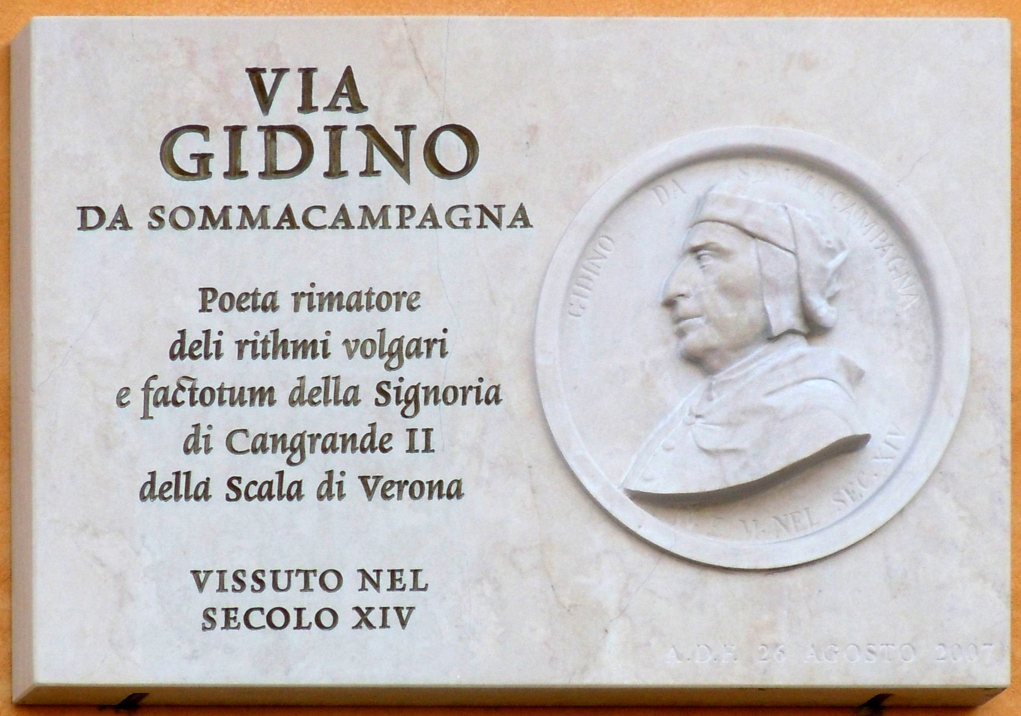 Sommacampagna, lapide a Gidino da Sommacampagna.